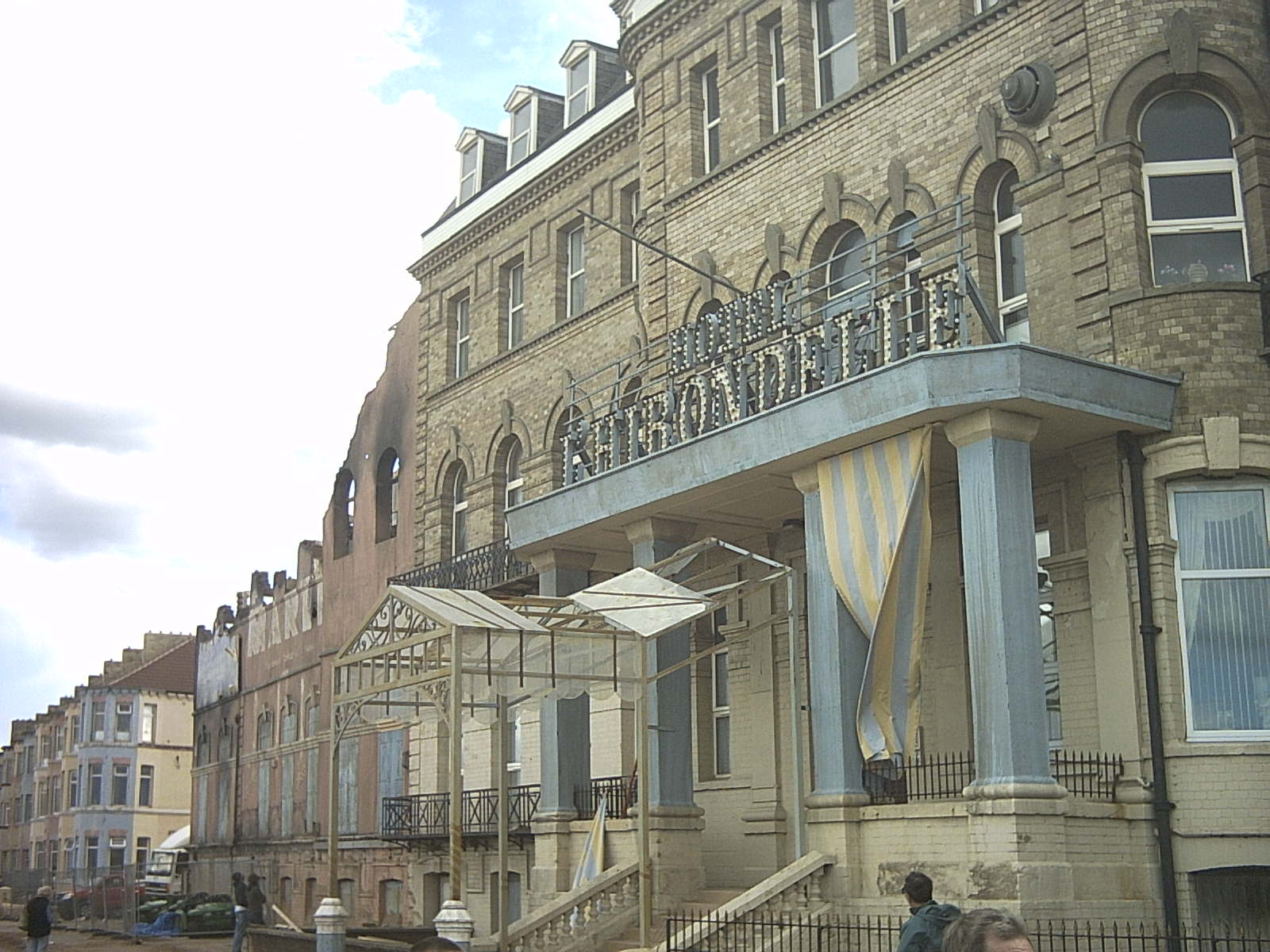 Film Set Redcar (August 2006)